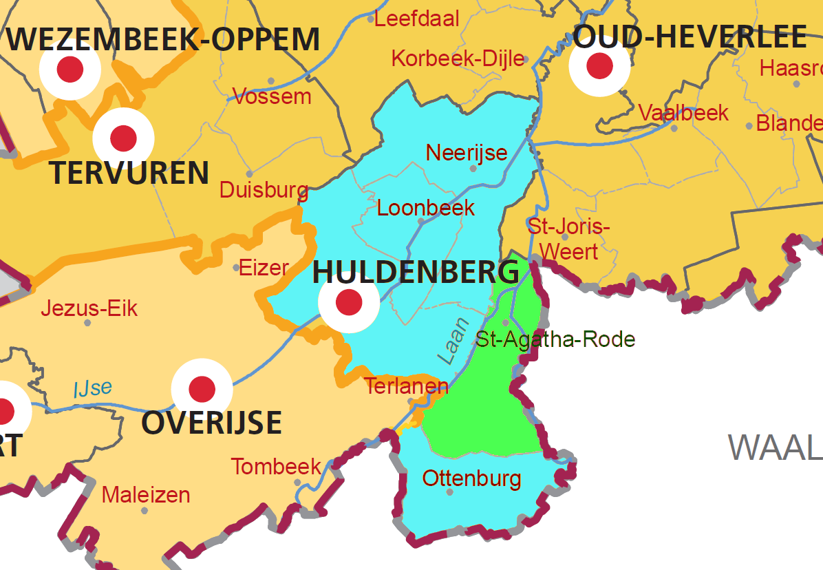 Situering van deelgemeente Sint-Agatha-Rode (groen) in fusiegemeente Huldenberg (blauw) en omliggende gemeenten (oranje tinten).